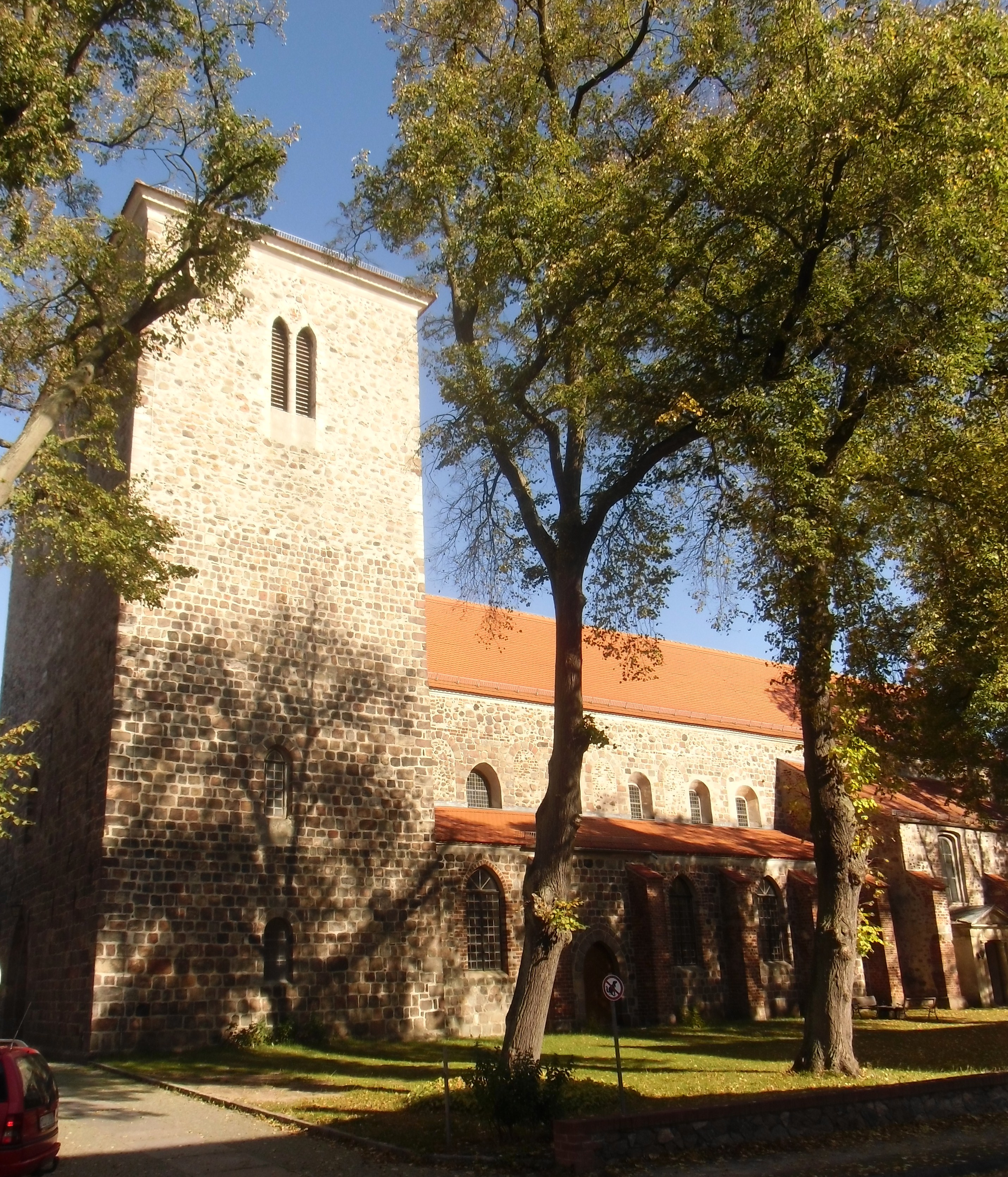 Evangelische Stadtpfarrkirche St. Marien, frühgotische Basilikakirche von Mitte des 13. Jahrhunderts, Turm von Mitte des 15. Jahrhunderts, Portalvorbau an der Südseite von der Grabpyramide des Reichsgrafen von Schmettau 1815 angefügt. Nr. 42 in der Liste der Baudenkmale in Strausberg.